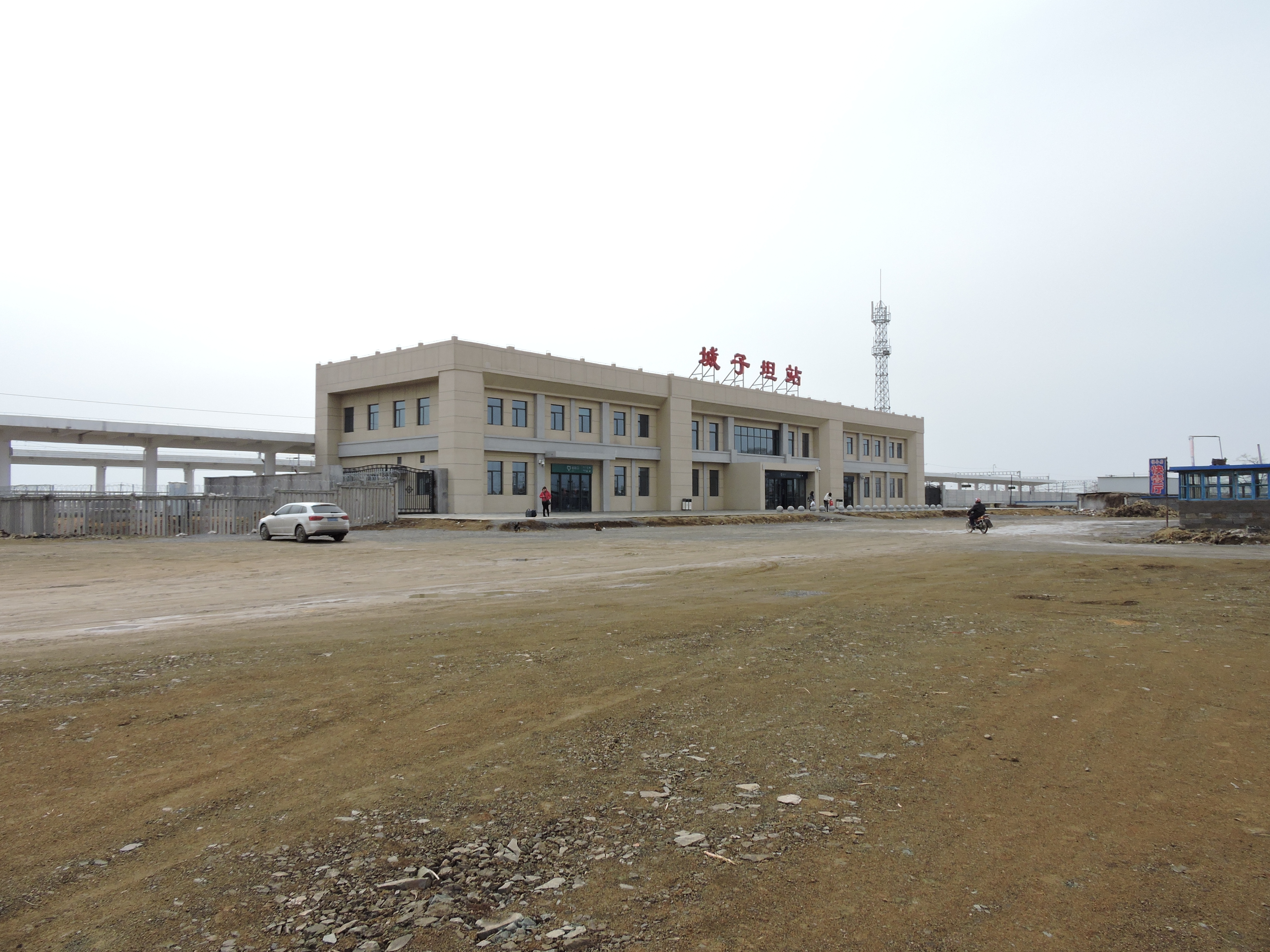 丹大城际铁路 城子坦站